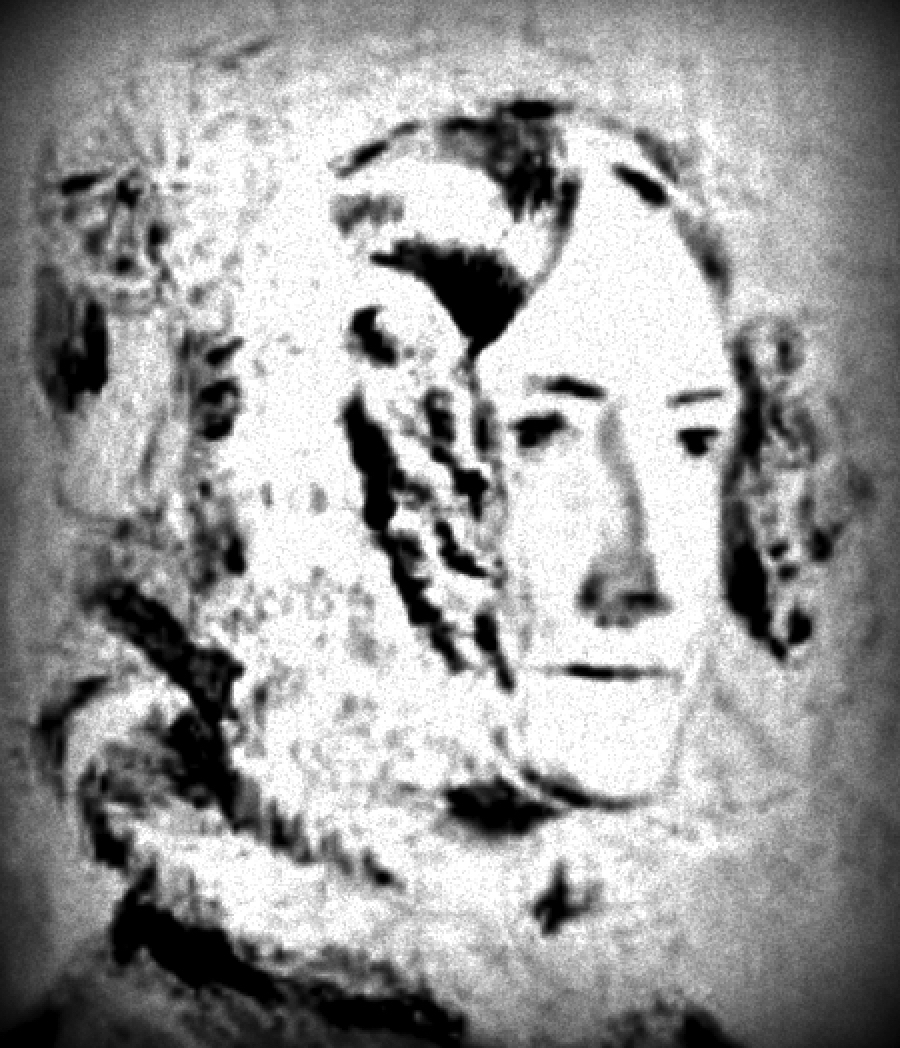 nach einem Gemälde von Joh. Christ. Dahl (1788-1857)